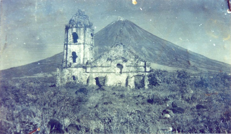 Cagsawa church